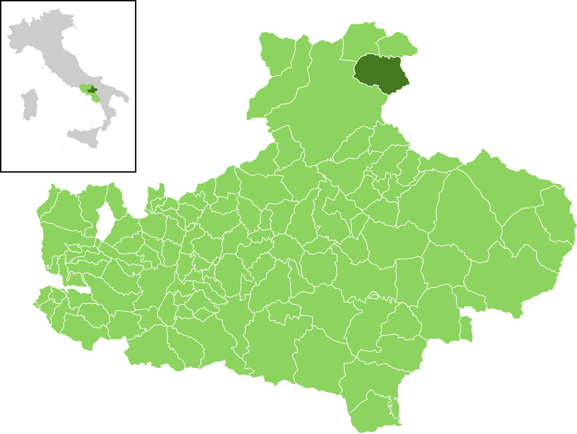 Posizione del comune all'interno della provincia di Avellino